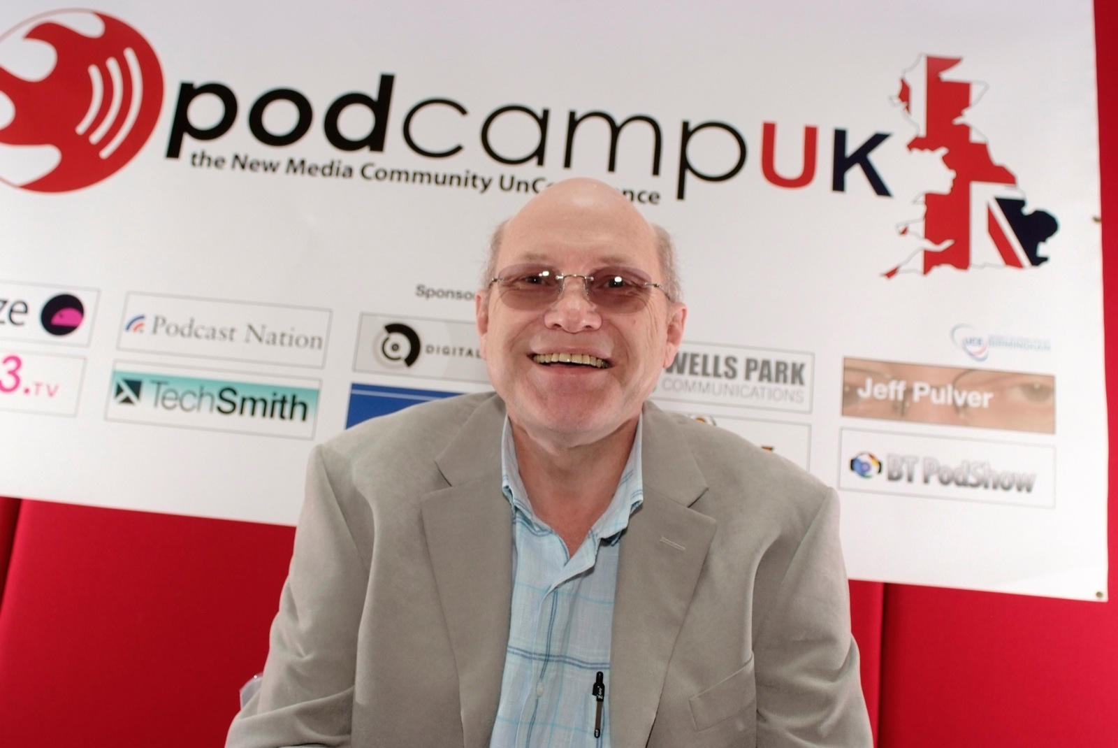 Trevor Dann at Pod Camp UK Attendees